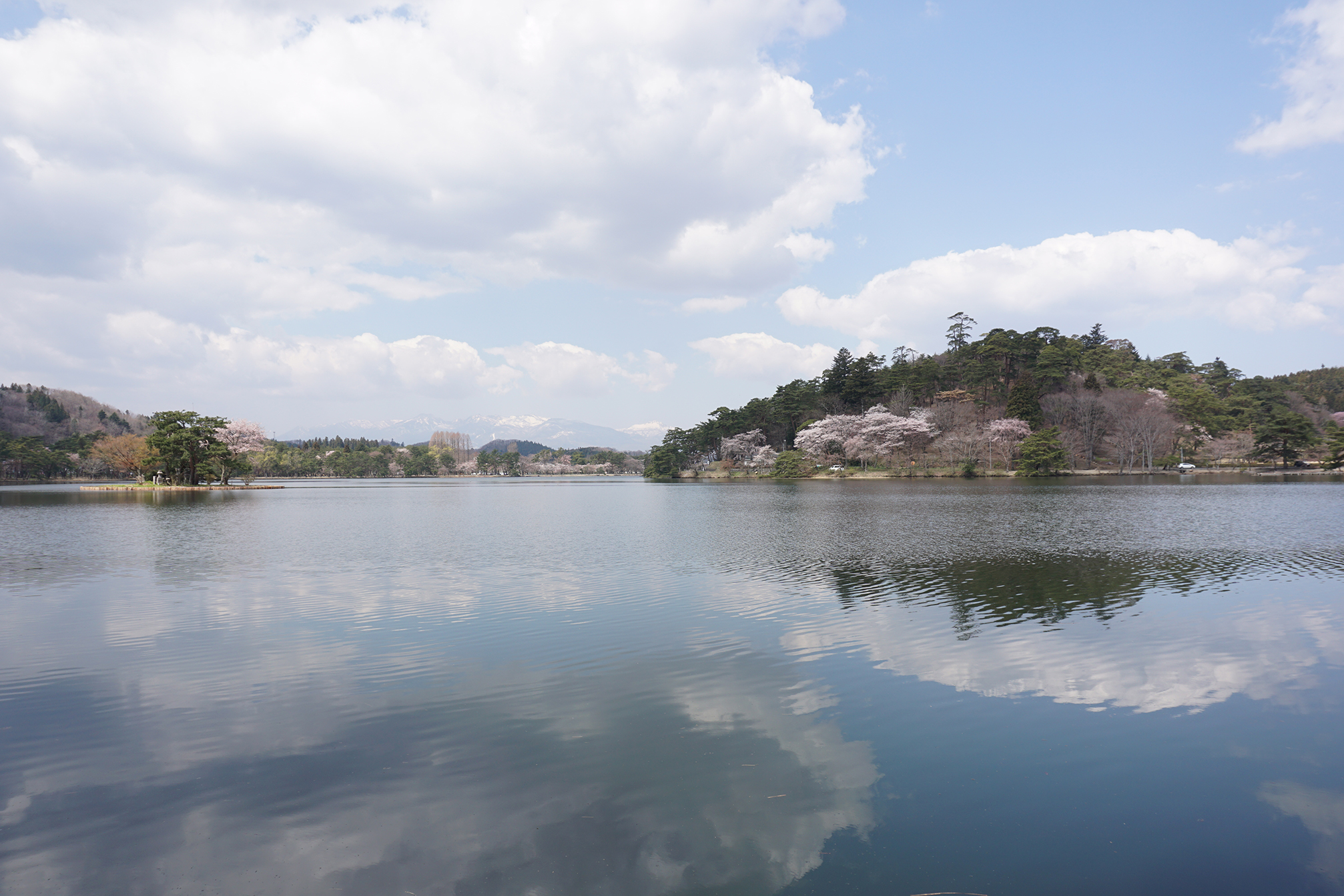 南湖（西側より）